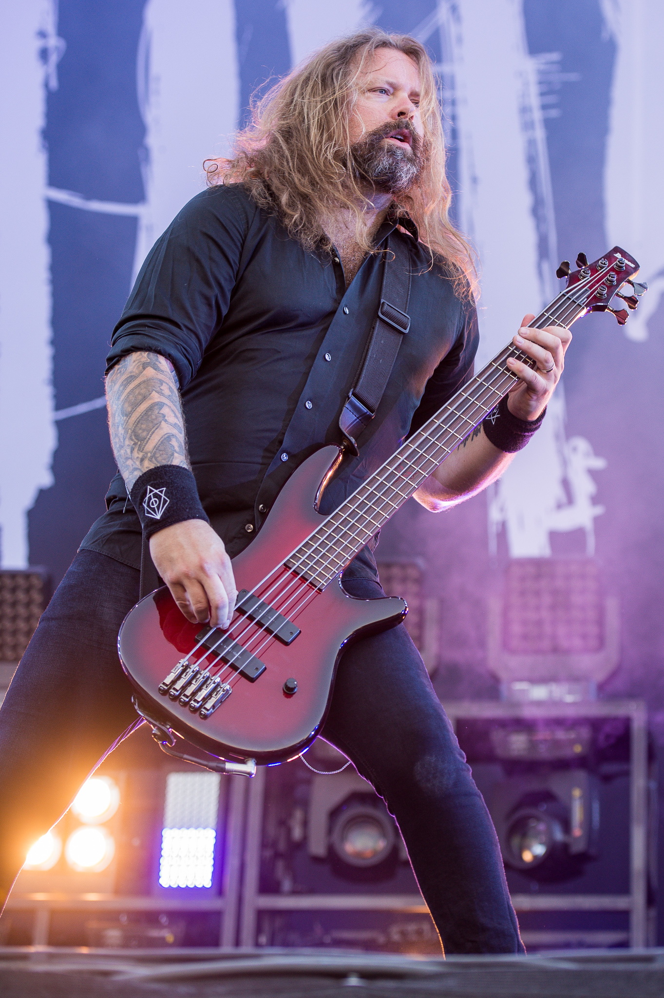 ARGO-Konzerte,Beck's Park Stage,Festival,In Flames,Konzert,Livekonzert,Livemusik,Musik,Peter Iwers,RiP,Rock im Park 2015